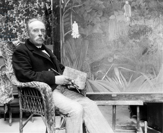 Rousseau dans son atelier de la rue Perrel devant le tableau Les Joyeux Farçeurs.